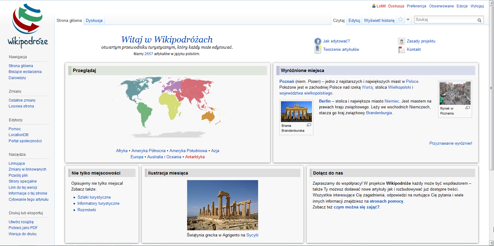 Screen strony Wikipodróże (Wikivoyage)